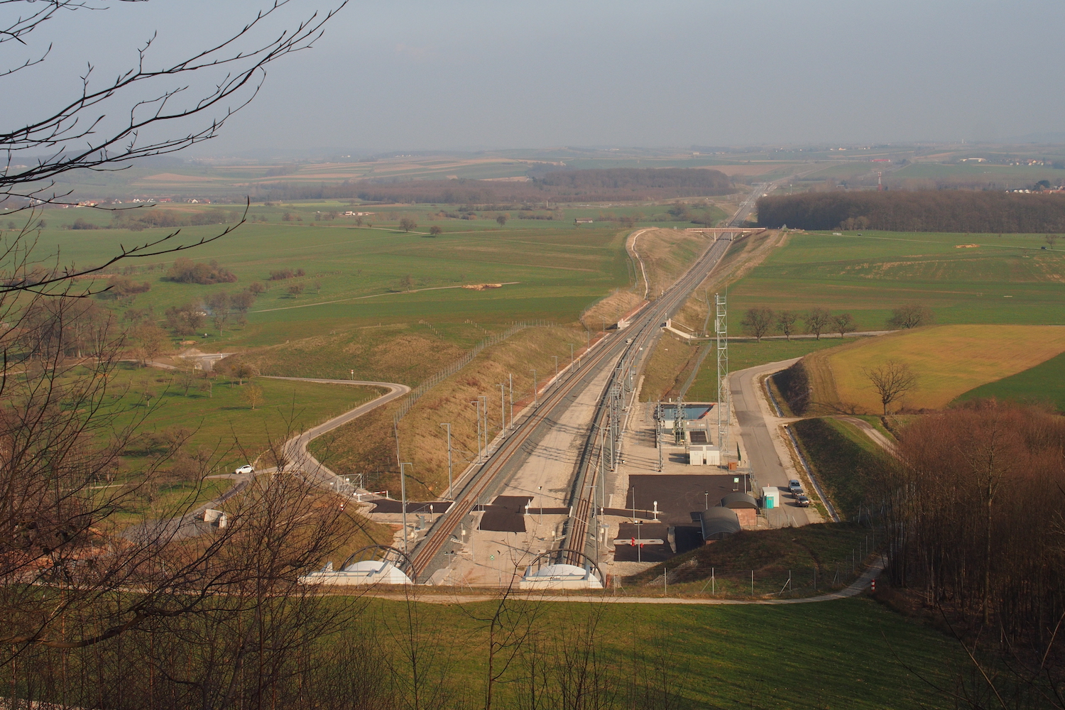 Vue surélevée depuis la sortie ouest du tunnel de Saverne, France.